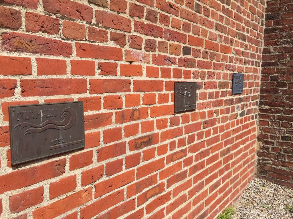 Flutmarken an der Aussenwand der Kirche in Klixbüll. 1532 (Allerheiligenflut 1532), 1634 (Burchardiflut) und zum Vergleich der virtuelle Sturmflutscheitelpunkt vom 26. Januar 1990 NN+4,80 m). Die Höhenmarke der Allerheiligenflut 1532 (NN+4,16 m) gilt als die älteste einer Nordseesturmflut.